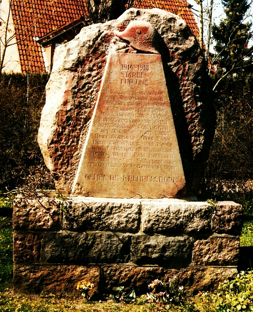 Behauener Findling auf Natursteinsockel. Vor dem ehemaligen Herrenhaus Krempelsdorf an der Krempelsdorfer Allee 19 steht auf einer kleinen Grünfläche von Linden umgeben das von Virck entworfene Ehrenmal zur Erinnerung an die im Ersten Weltkrieg gefallenen Soldaten der Gemeinde Krempelsdorf. Das Denkmal besteht aus einem einfachen Findling auf Natursteinsockel. Die trapezförmige Gedenkplatte auf der Vorderseite wird bekrönt von Stahlhelm und Eichenlaub im Relief und trägt die Inschrift: „1914-1918 starben für uns“; es folgen in zwölf Zeilen die Namen der 24 Gefallenen und die Nennung des Stifters „Gemeinde Krempelsdorf“.